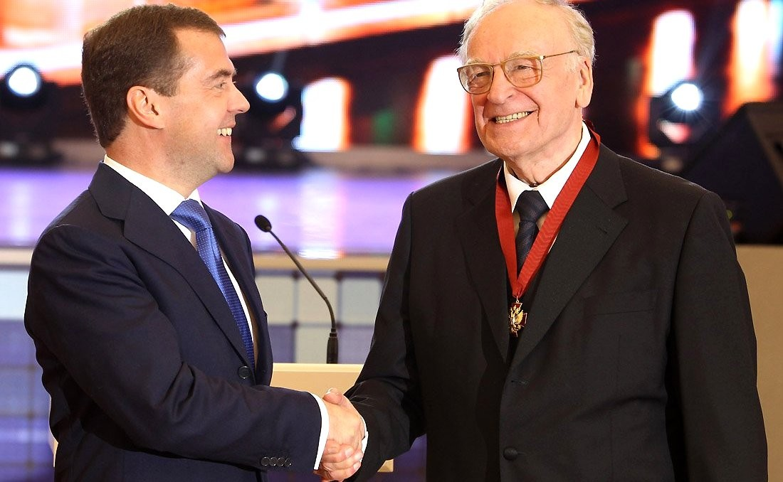 Награждение Президентом РФ Игоря Кириллова Орленом "За заслуги перед Отечеством" III степени